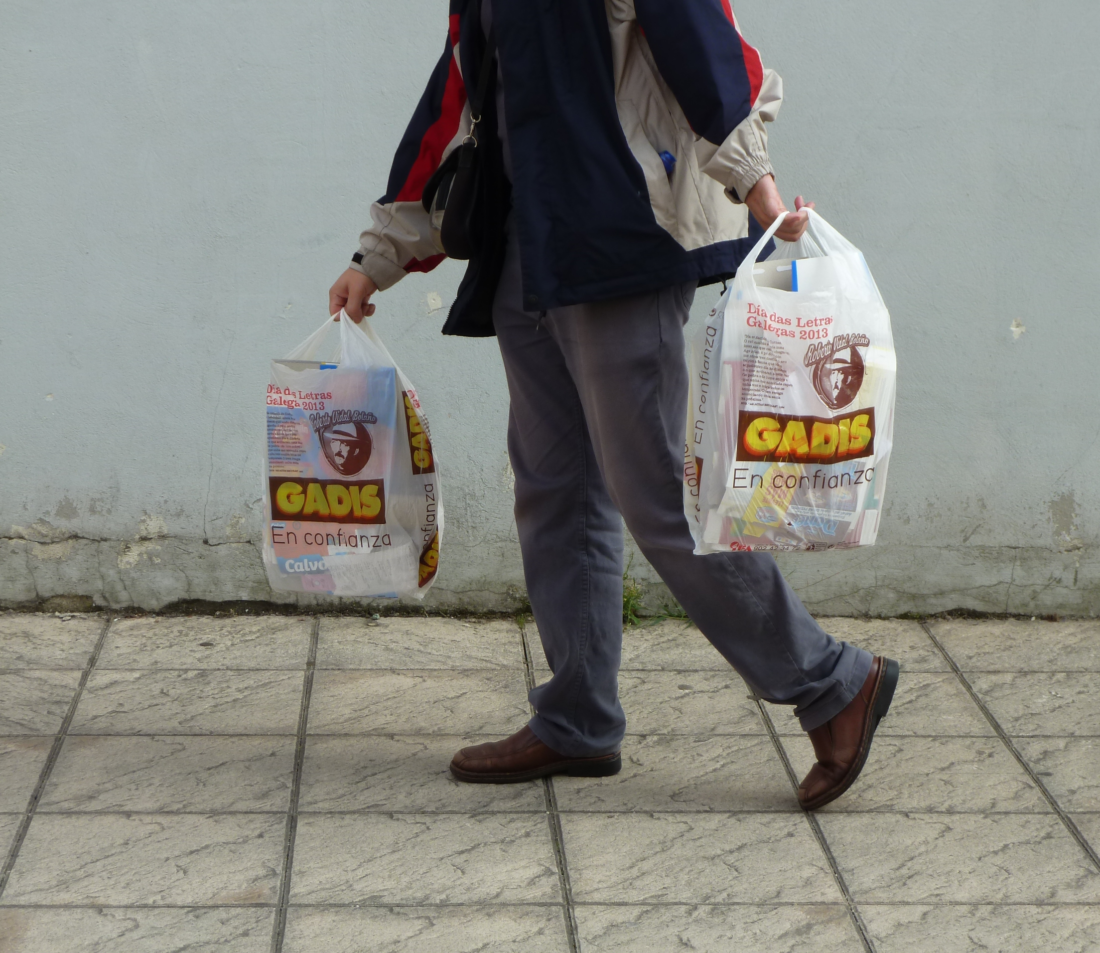 Co gallo da celebración do Días das Letras Galegas do ano 2013 en honor de Roberto Vidal Bolaño, o grupo empresarial Gadis repartiron bolsas coa imaxe do escritor e un fragmento da súa obra "As Actas Escuras", de 1994.